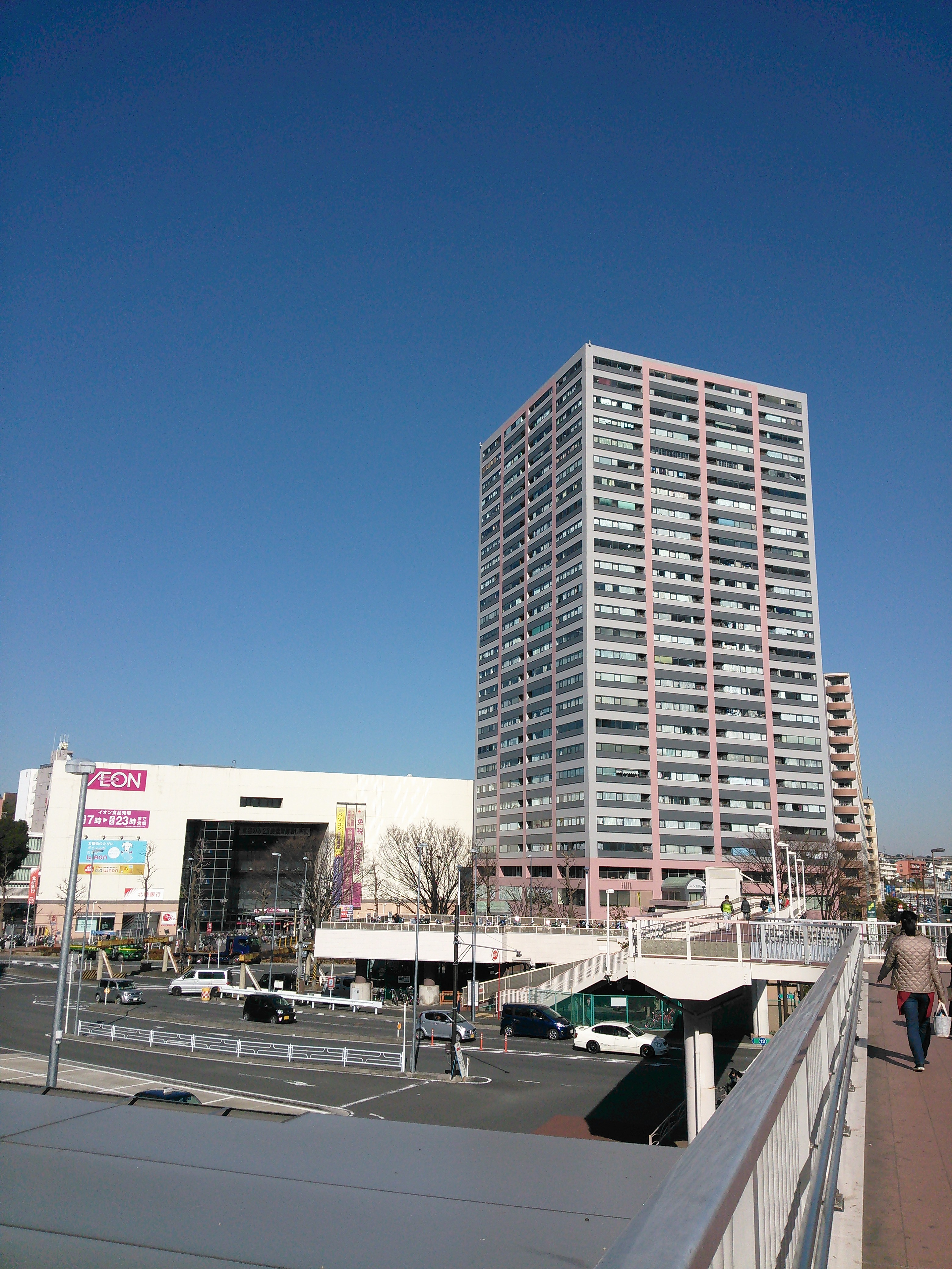 横浜市神奈川区、トーカイプラザ